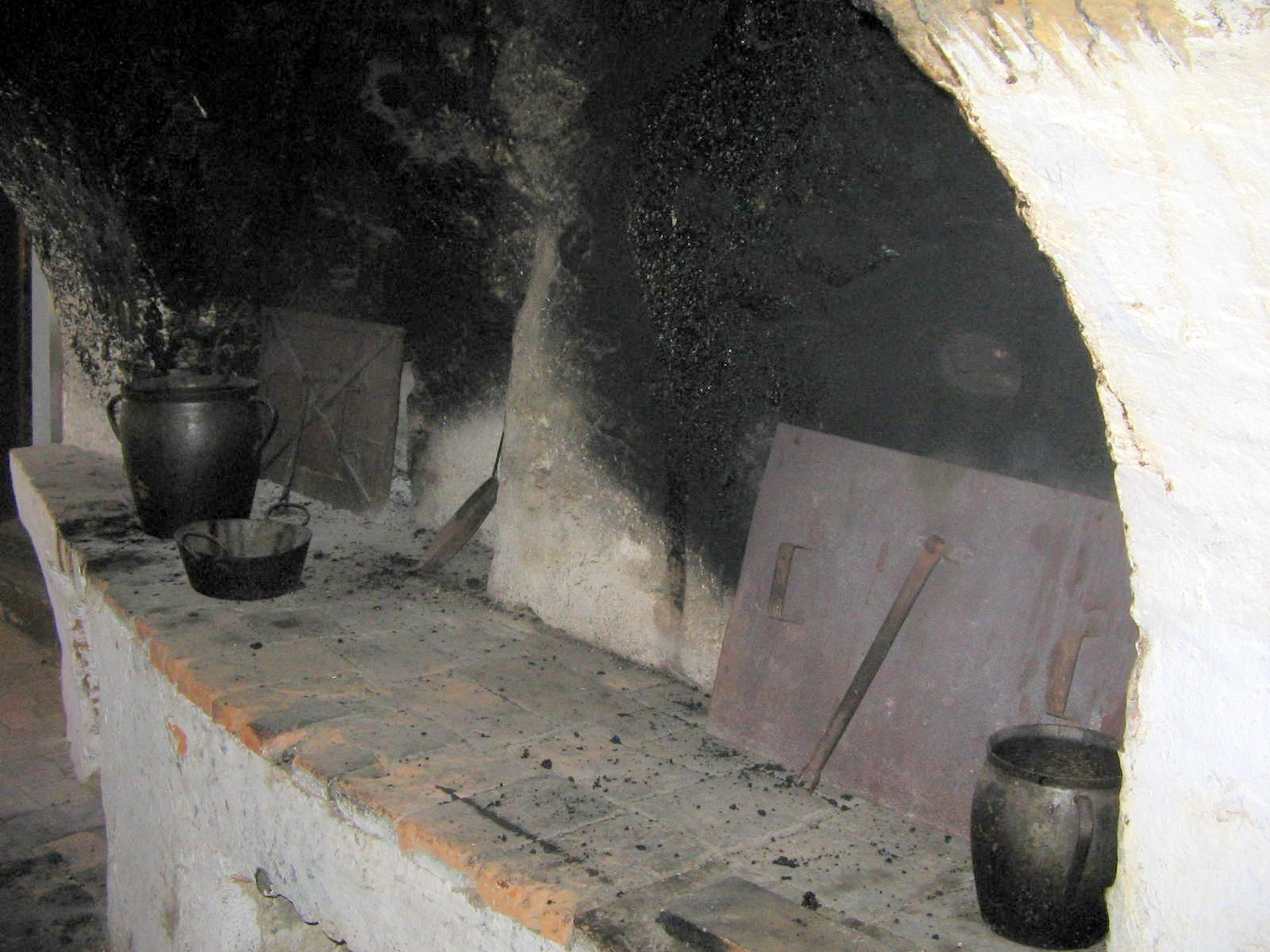 Open air museu, Kurnik House, Tržič, Slovenia